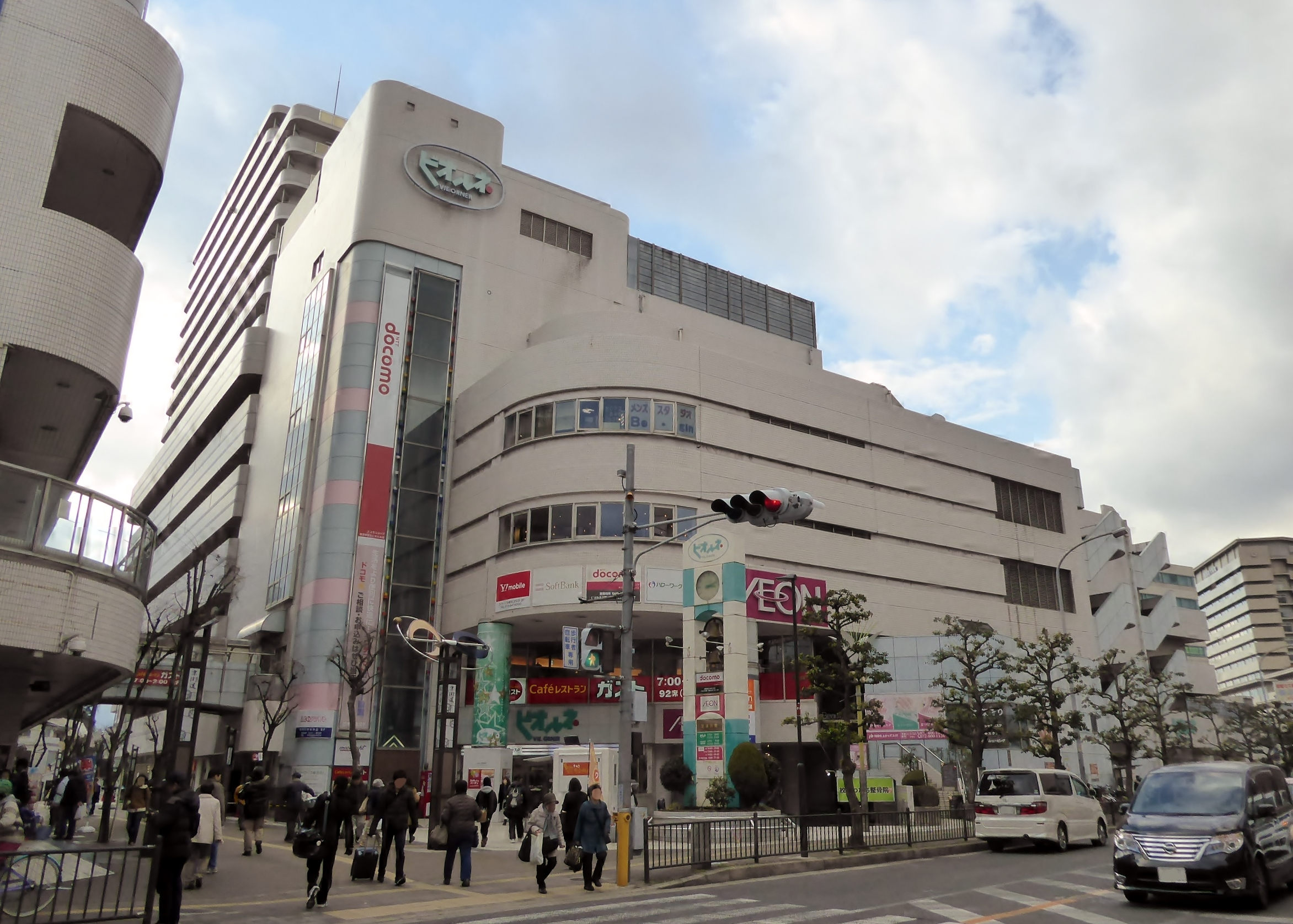 2018年1月6日時点のビオルネを撮影。